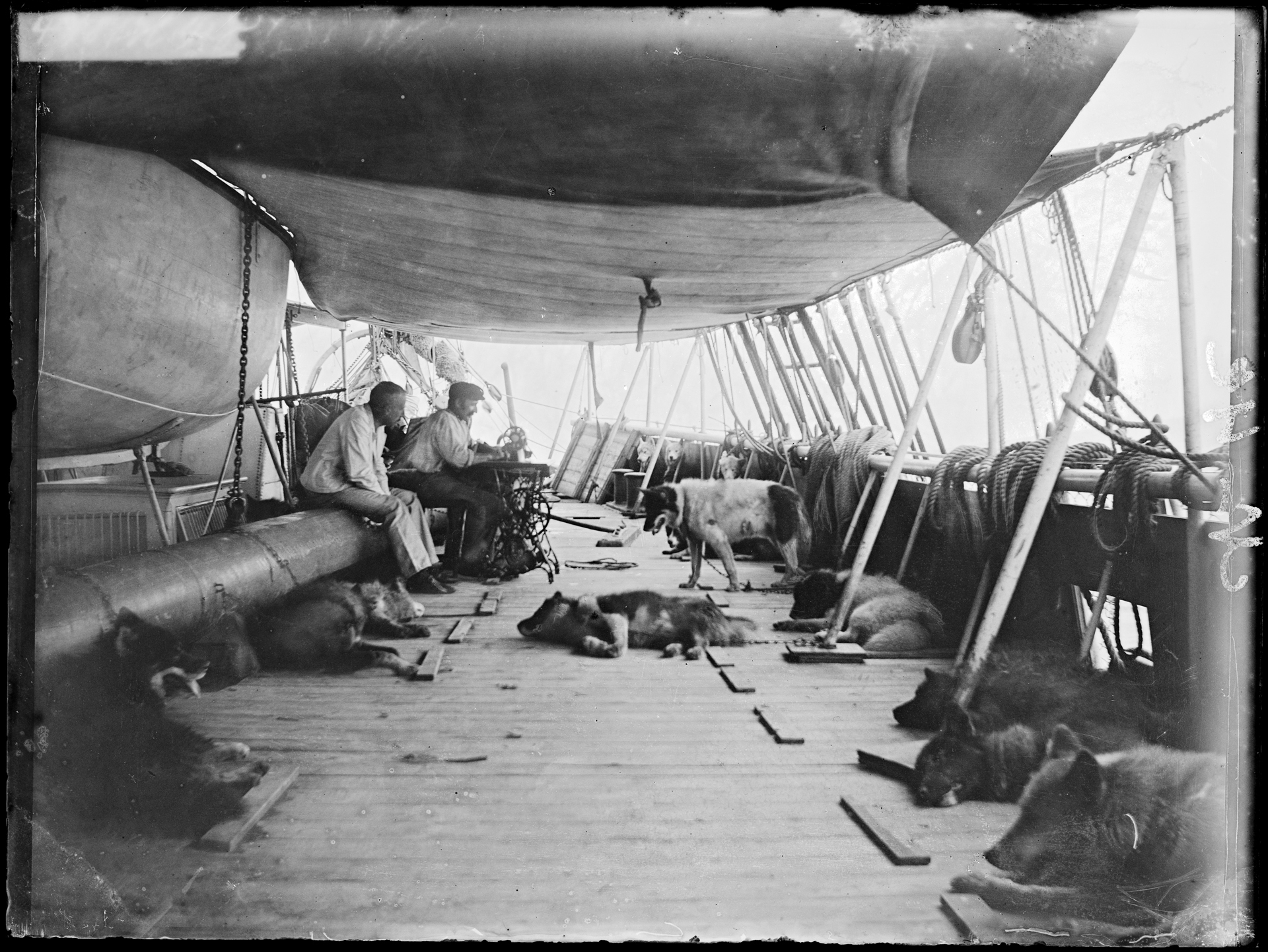 Tittel / Title: Roald Amundsen ser på Martin Rønne som syr på maskin Motiv / Motif: Over dem var det trukket solseil som sørget for at alle hundene lå i skyggen på reisen til Antarktis. Dato / Date: 1910 Fotograf / Photographer: ukjent / unknown Sted / Place: Norge - Antarktis Eier / Owner Institution: Nasjonalbiblioteket / National Library of Norway Lenke / Link: Bildesignatur / Image Number: bldsa_NPRA1105